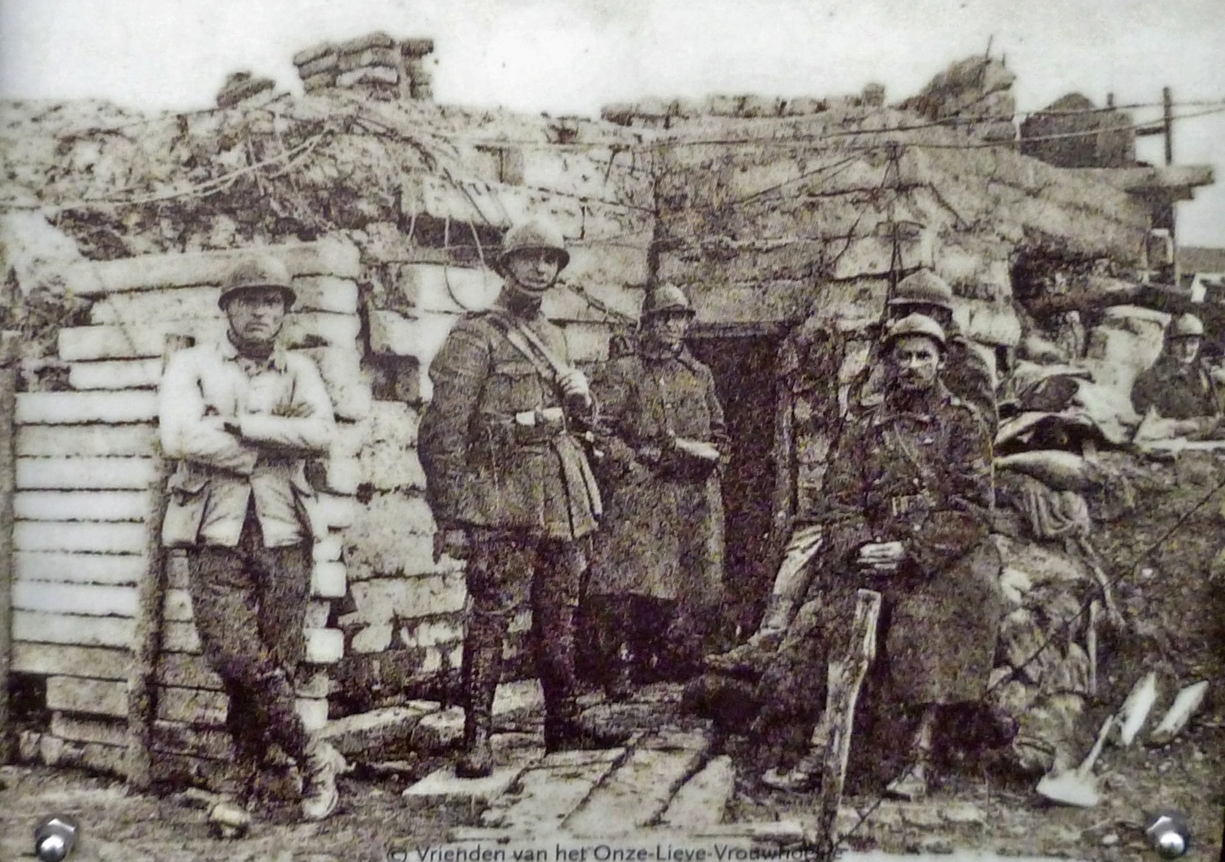 Belgische militairen bij het Onze-Lieve-Vrouwhoekje in Stuivekenskerke (Diksmuide), Belgische artillerieobservatiepost gedurende de Eerste Wereldoorlog; plaats waar de Duitsers tot staan werden gebracht.